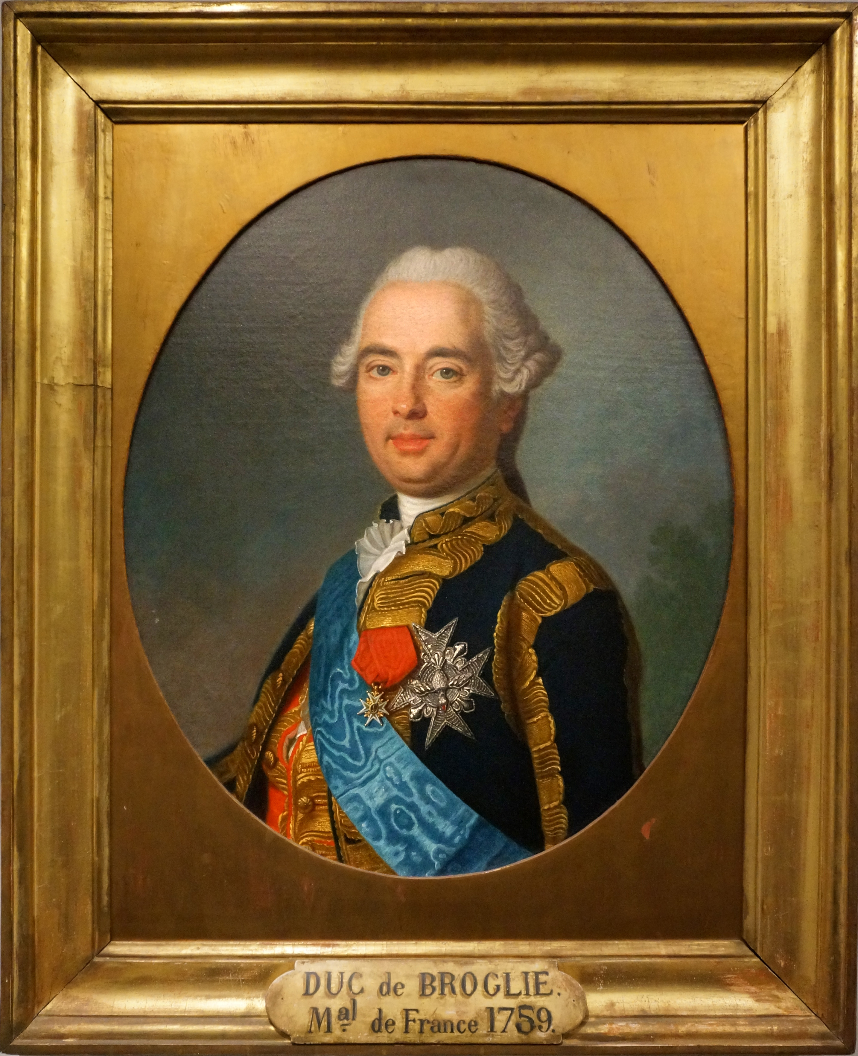 Présenté au Musée de l'armée.